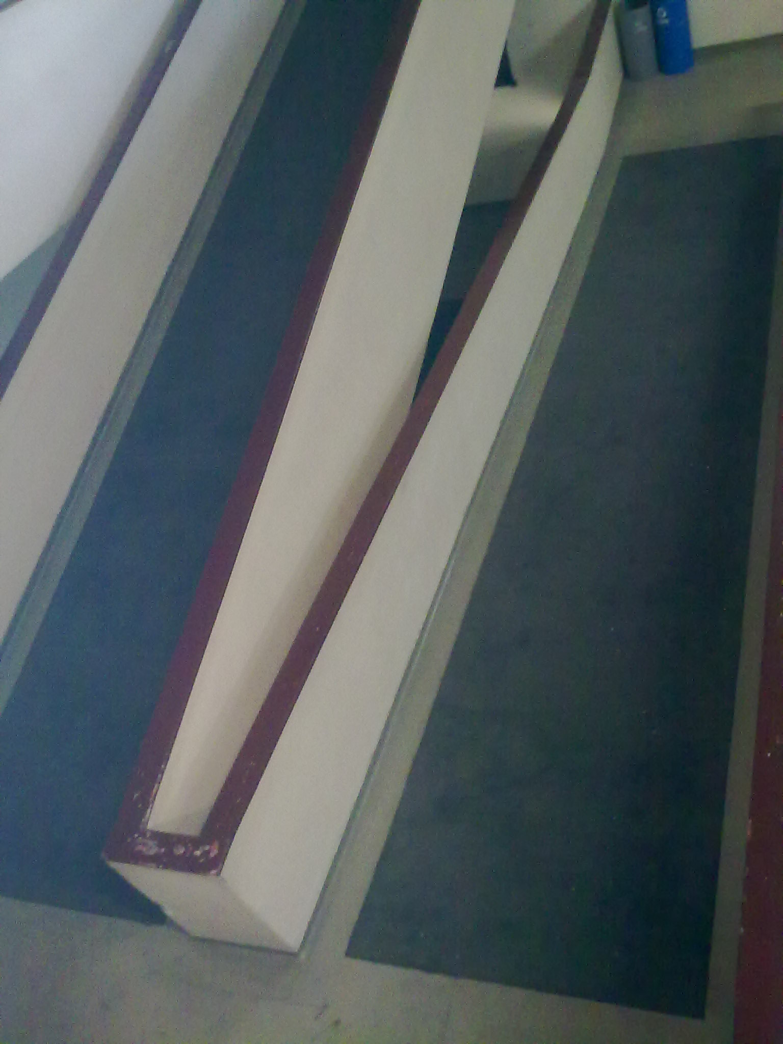 Rampas no campus I do Cefet-MG, em Belo Horizonte, Brasil.